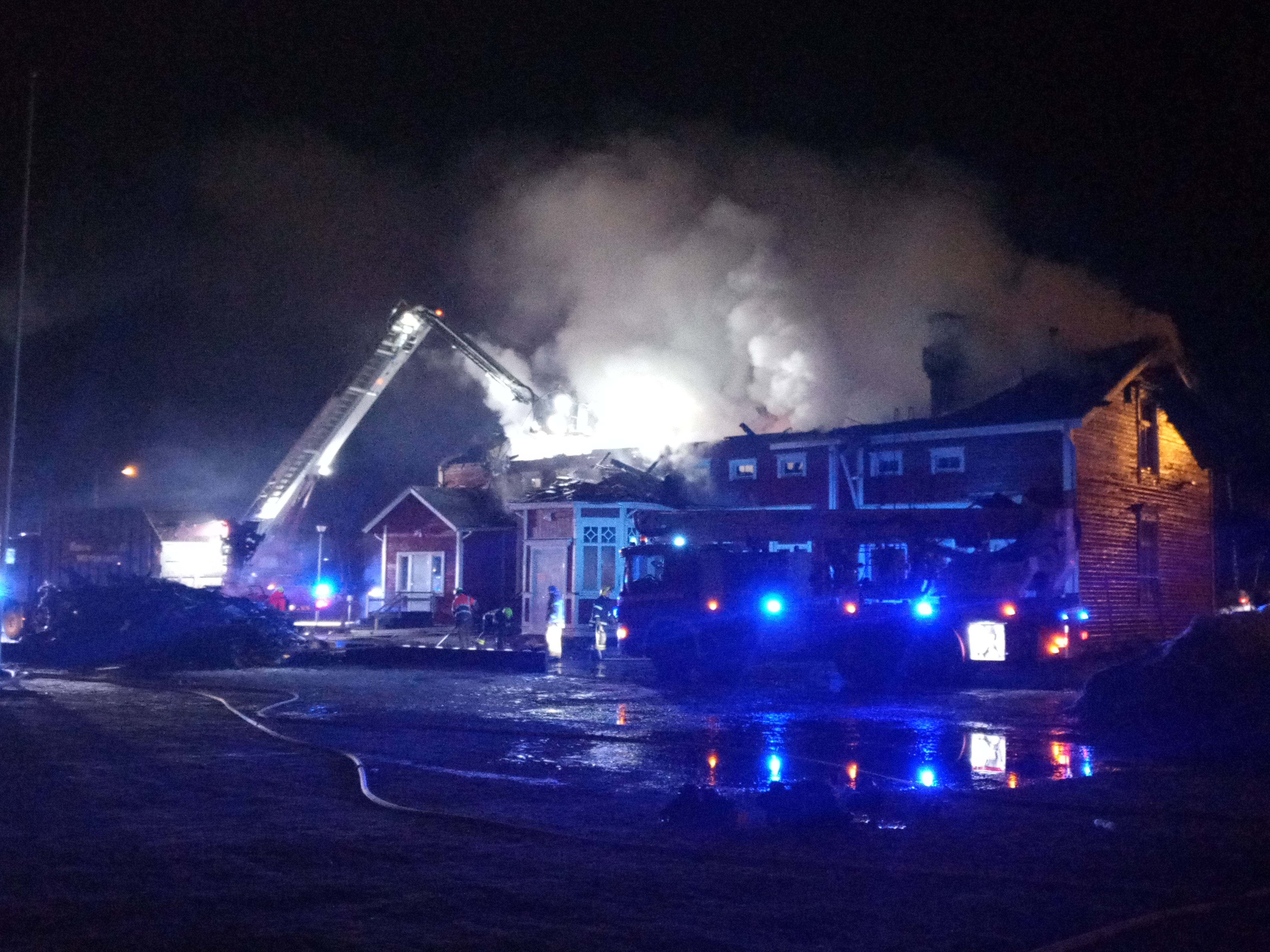 Kempeleen vanhan pappilan tulipalon sammutustöitä myöhään illalla 16.4.2019. Pappila on rakennettu vuonna 1899.